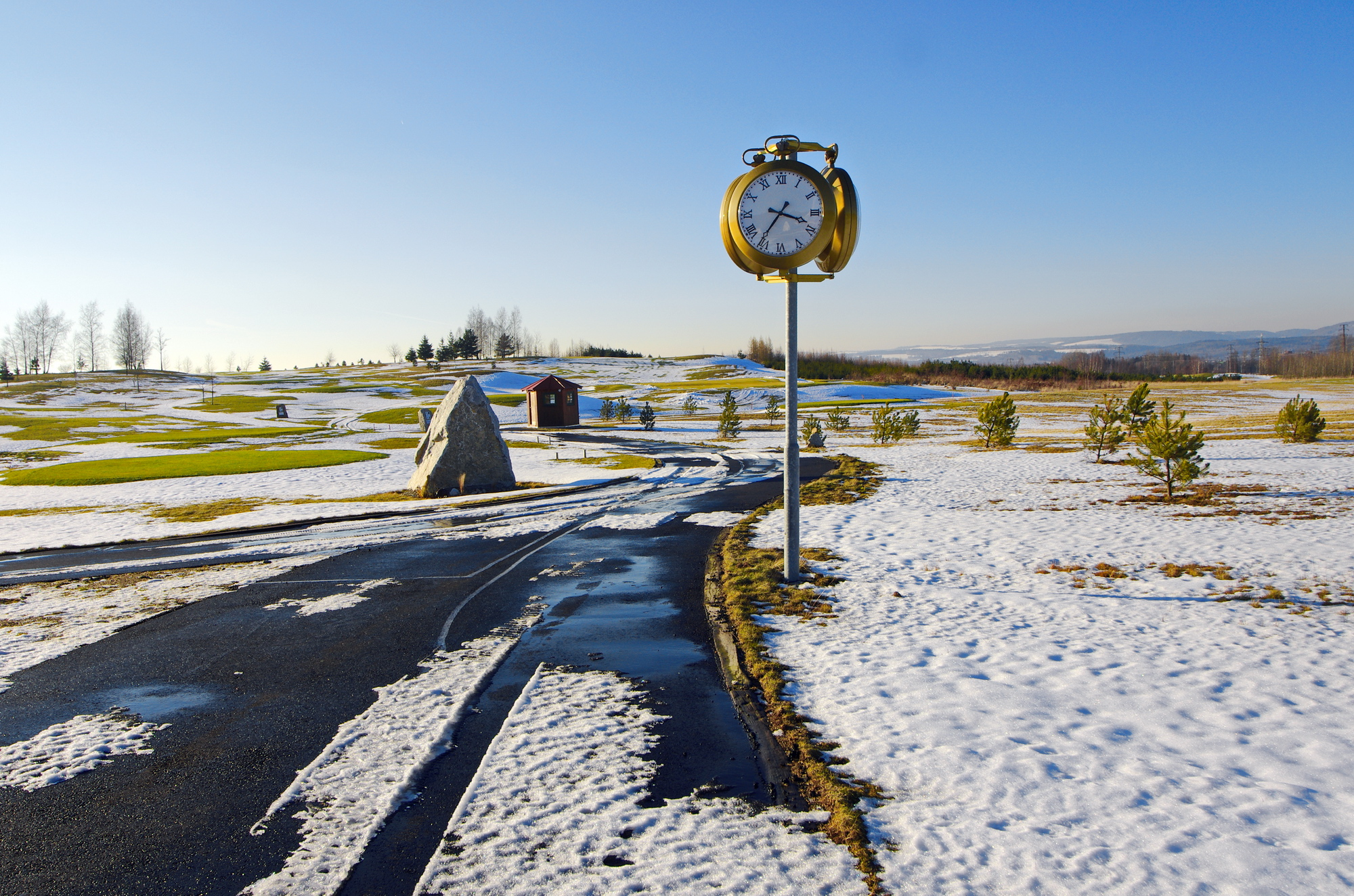 Výsypka Silvestr, golfové hřiště, okres Sokolov